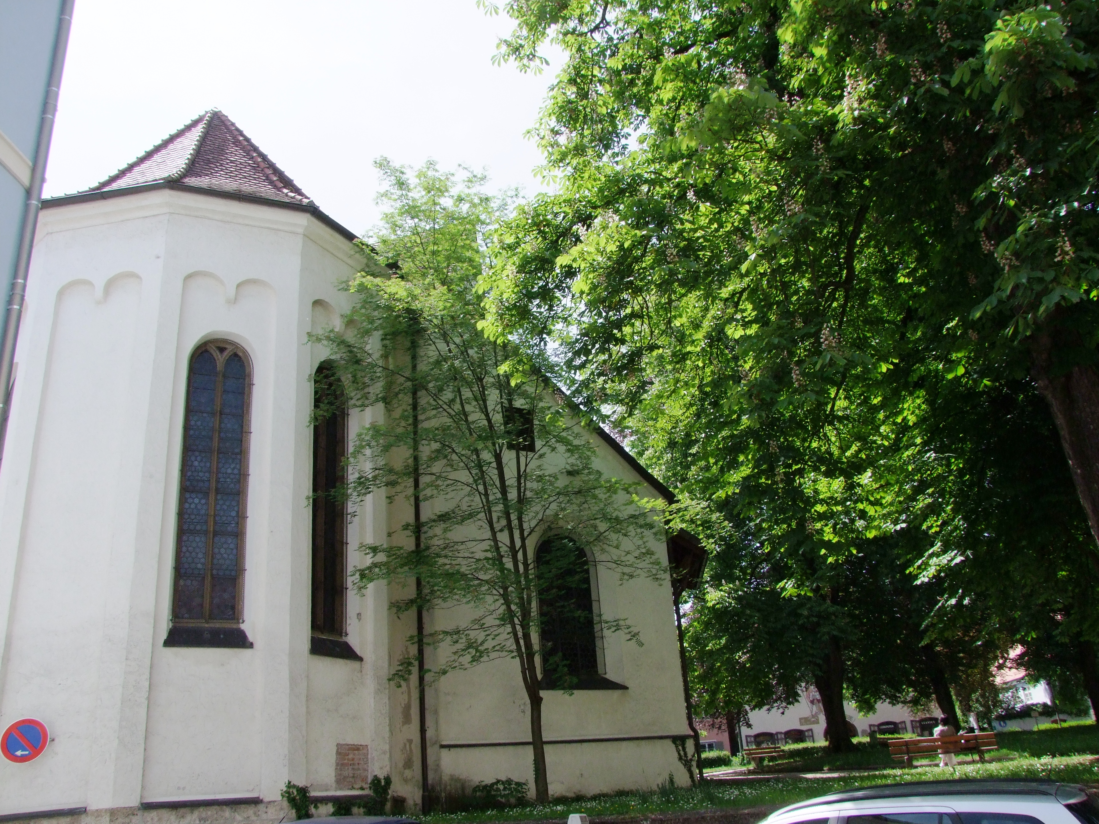 Kinderlehrkirche von Osten, Chor schiebt sich in die Fuggergasse